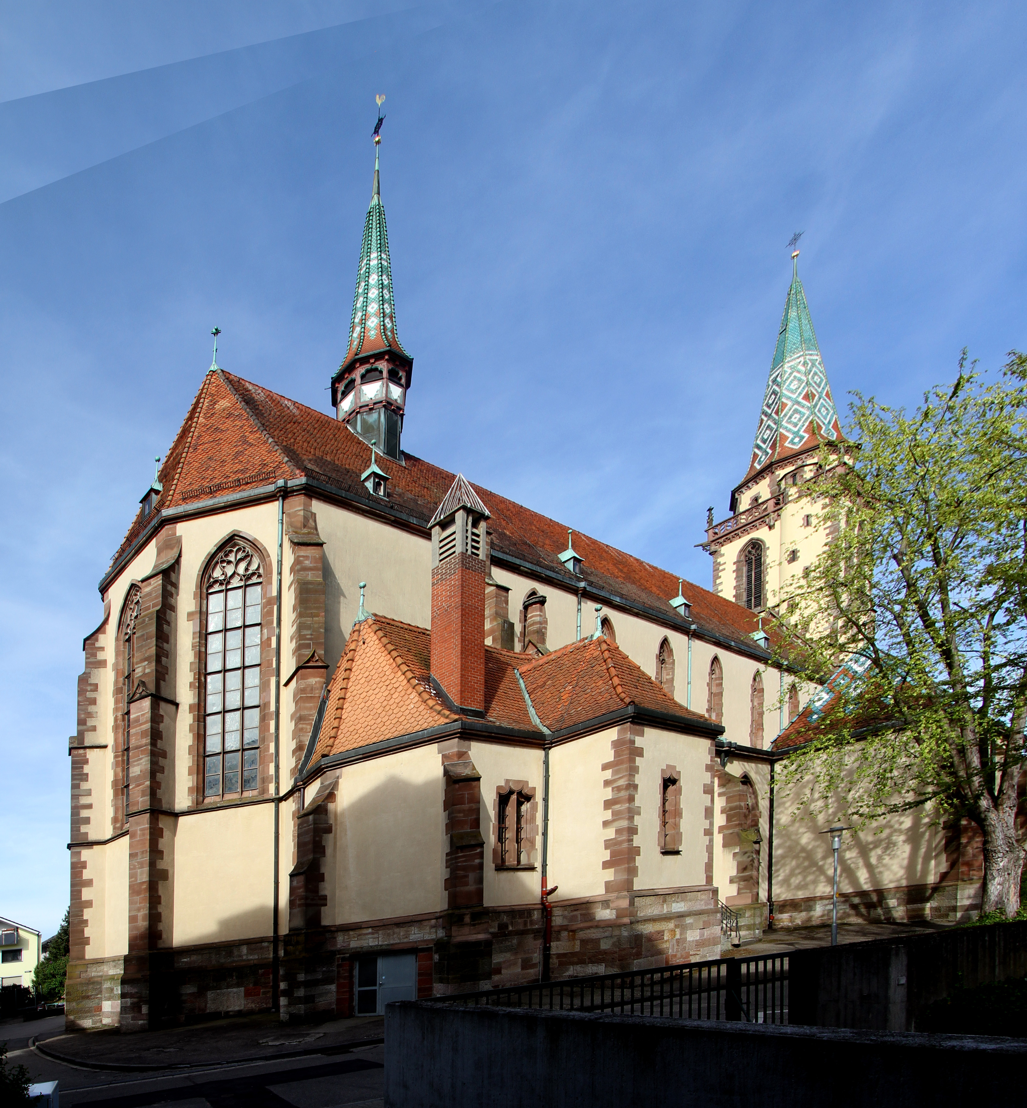 Kirche St. Martin in Sinzheim/Baden-Württemberg